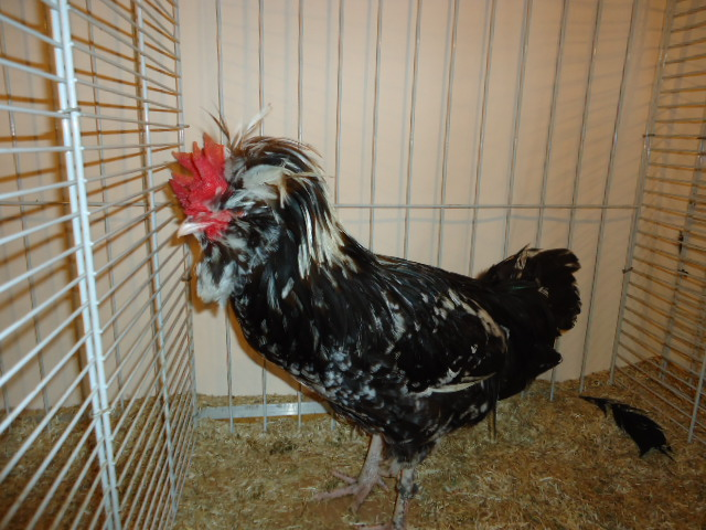 Coq Houdan